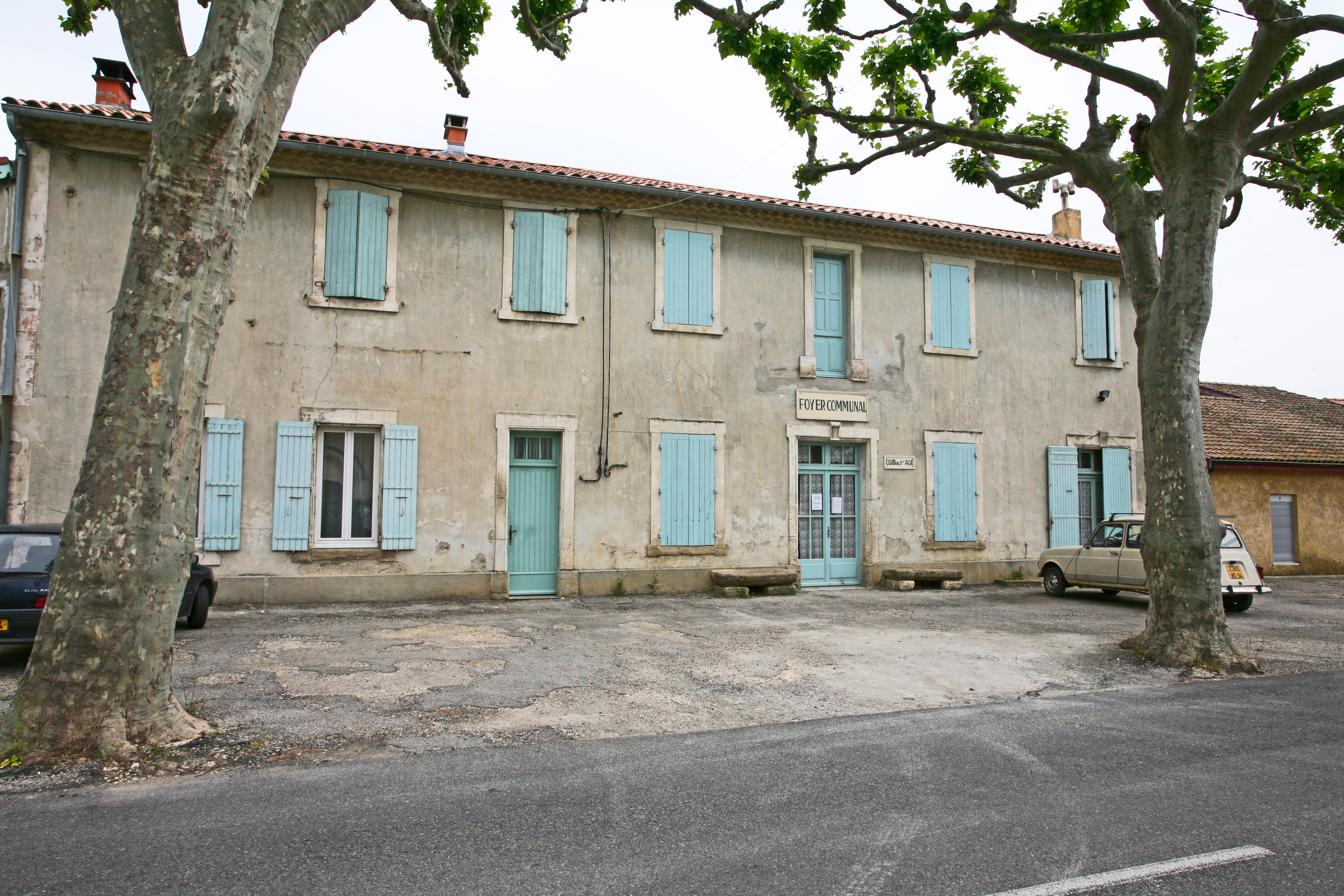 Foyer communal de Travaillan (commune de Vaucluse)